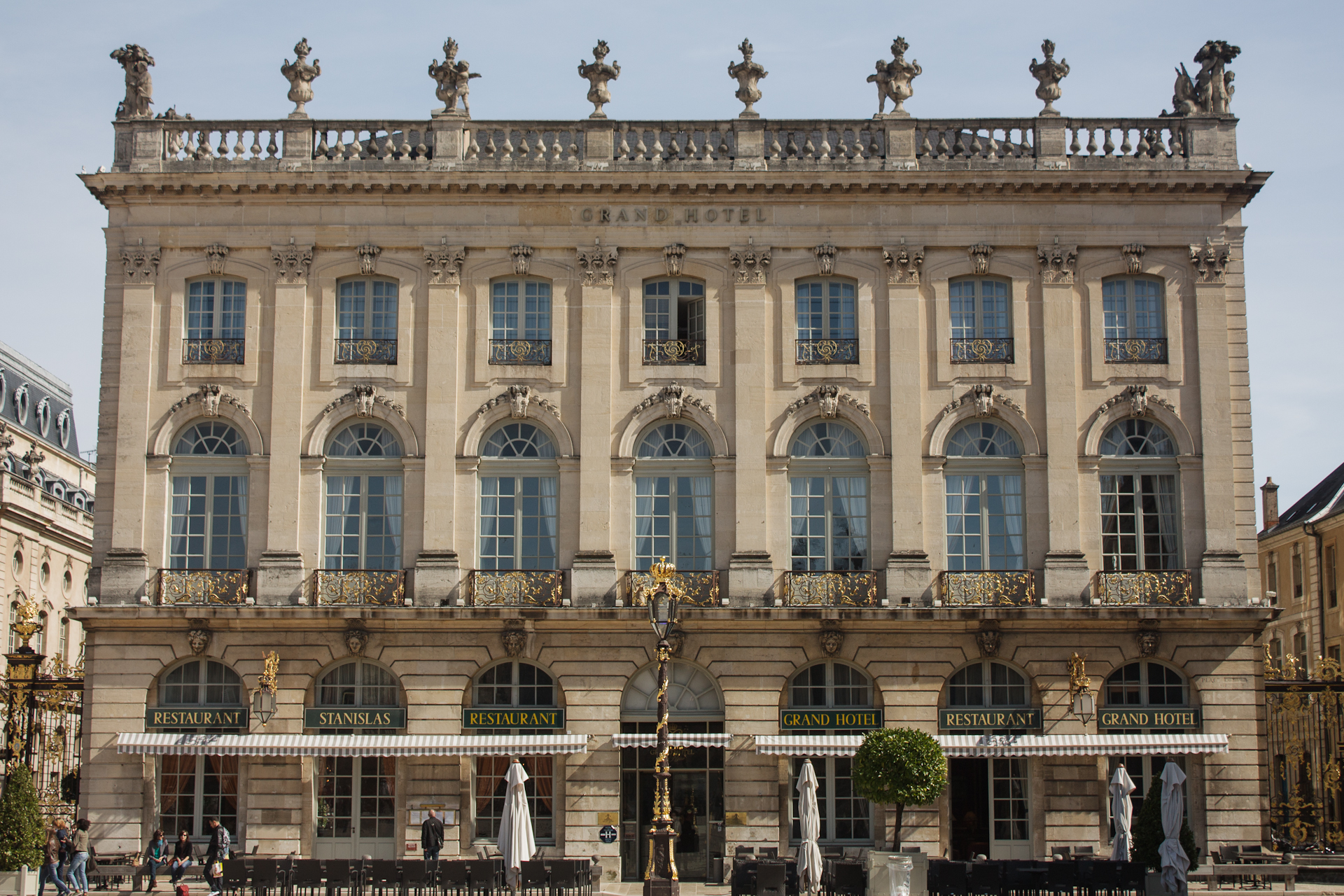 Immeubleélévation, toiture, 2 place Stanislas (Classé, 1929)